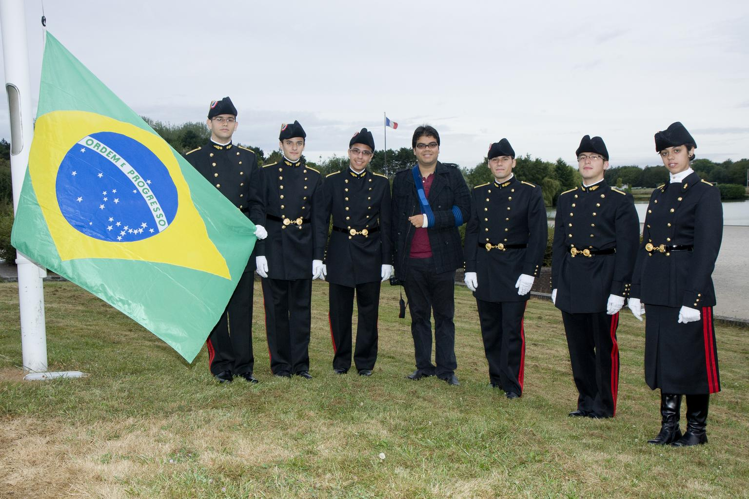 École polytechnique, élèves brésiliens.